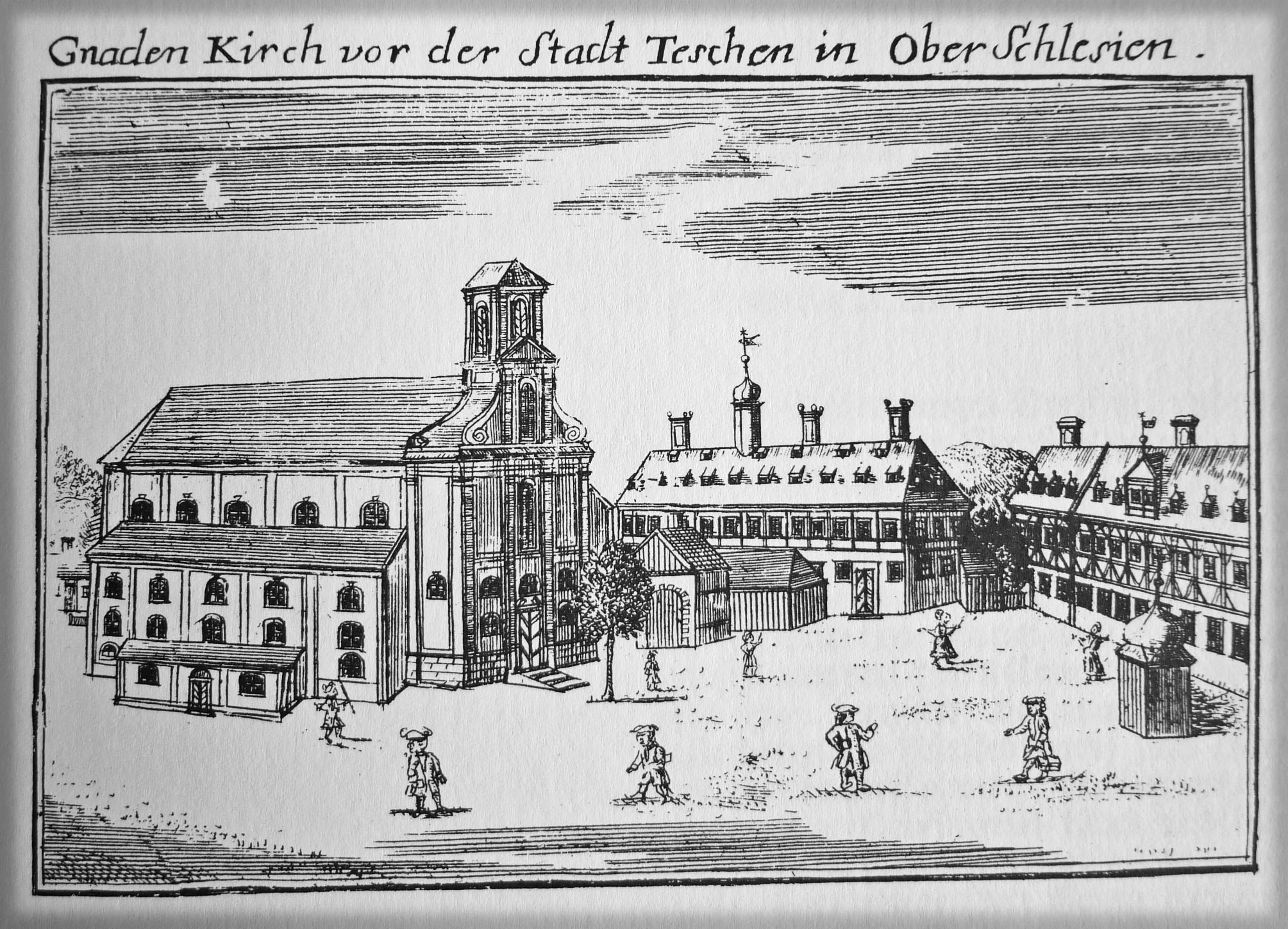 Gnadenkirche in Teschen (Oberschlesien) aus Friedrich Bernhard Werner: Schlesische Bethäuser (1748-52)